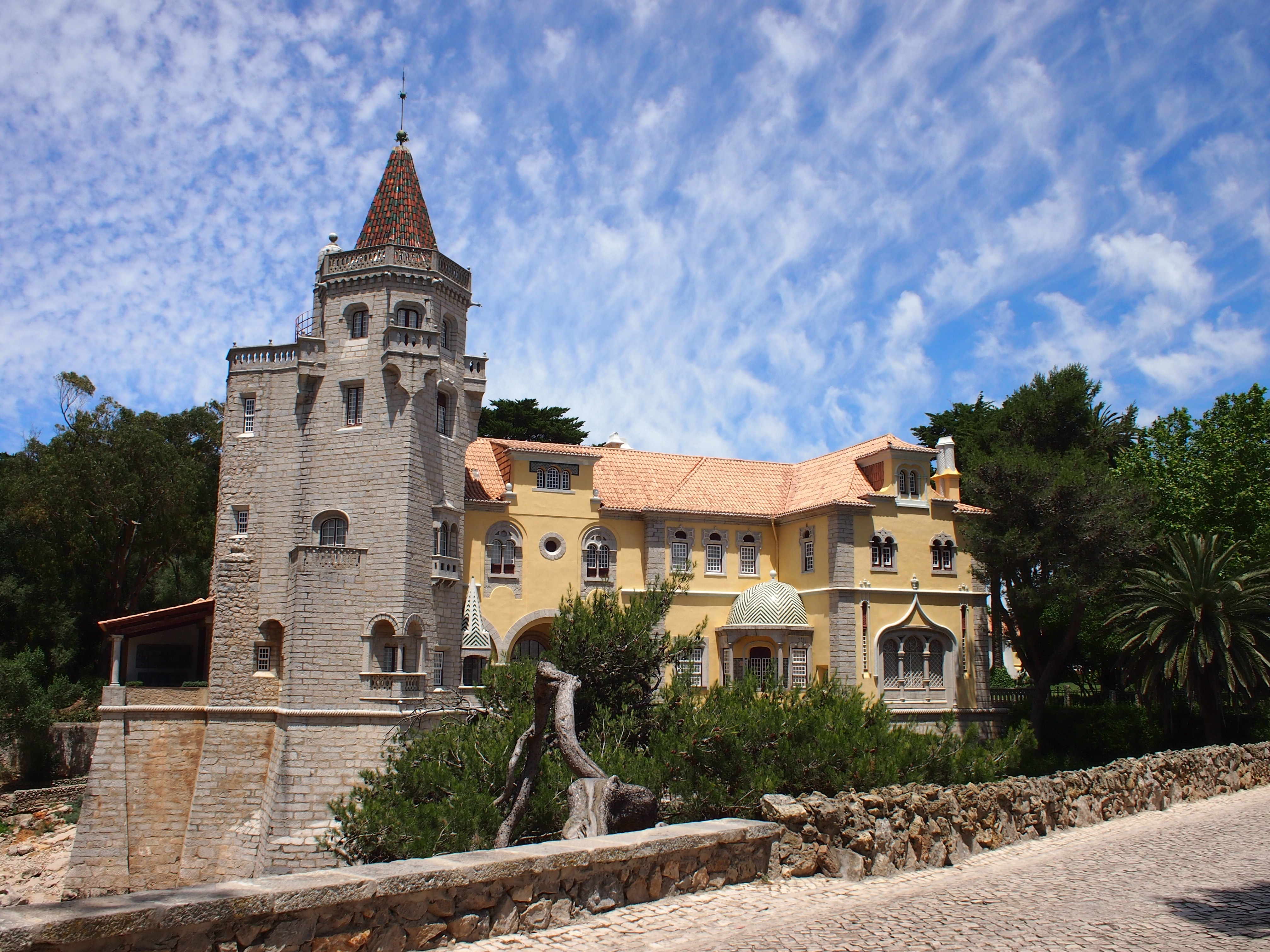 View of Condes de Castro Guimarães Palace in Cascais, Portugal